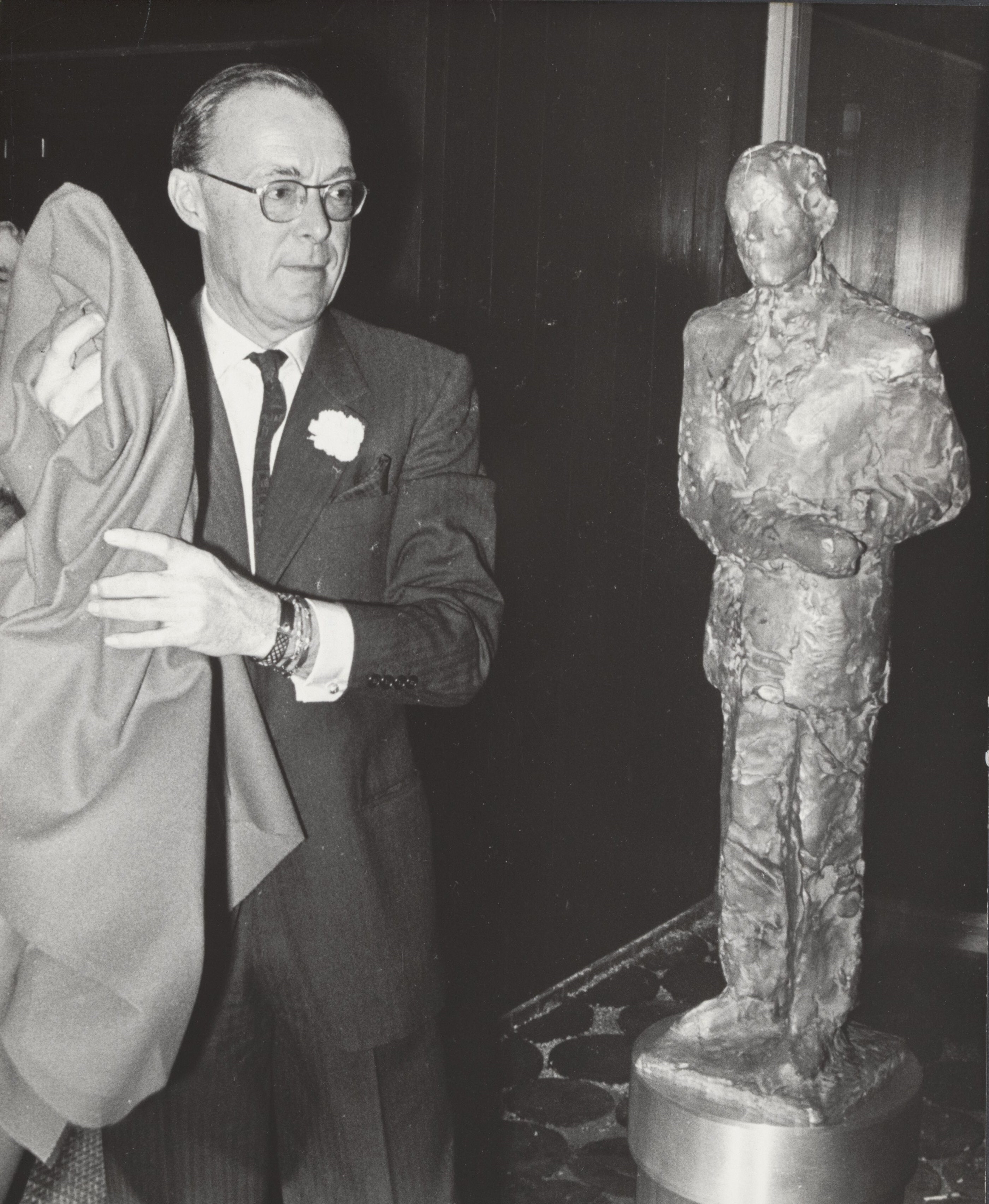 Prins Bernhard onthult beeld van Victor Koningsberger, Koninklijk Instituut voor de Tropen (20 dec. 1968)